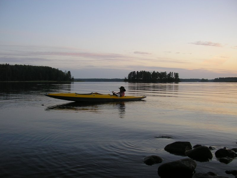 Каркасная байдарка в действии (разгруженная, без матроса).